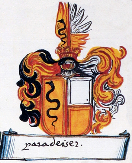 Grb plemičev Paradeiser